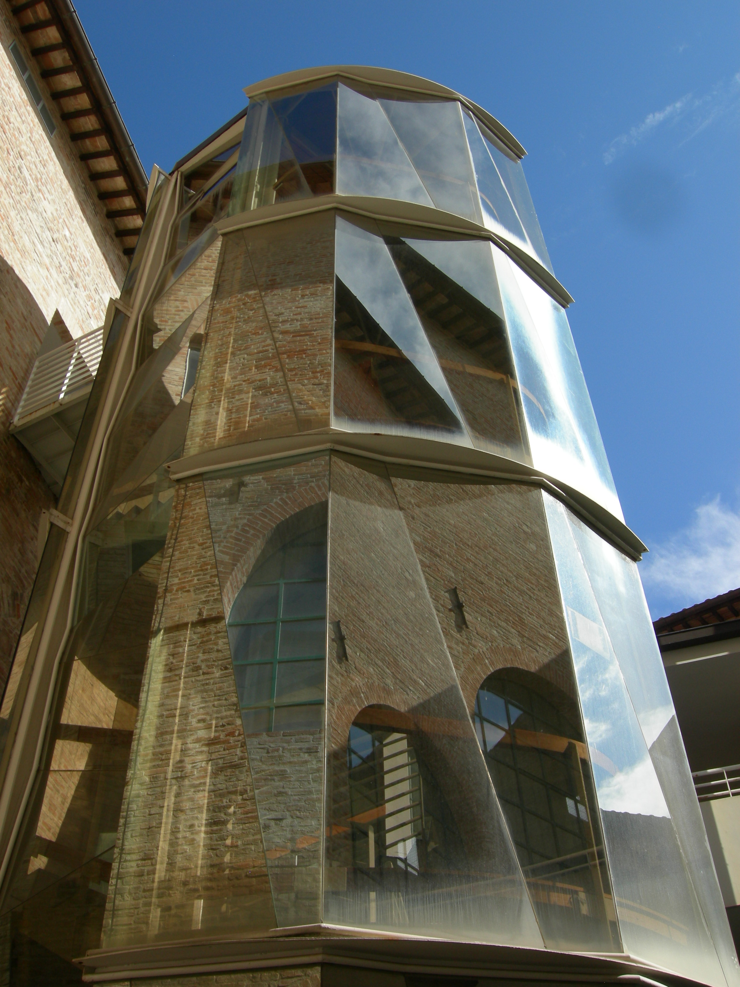 veduta della struttura esterna della scala a chiocciola della Facoltà di Economia di Urbino